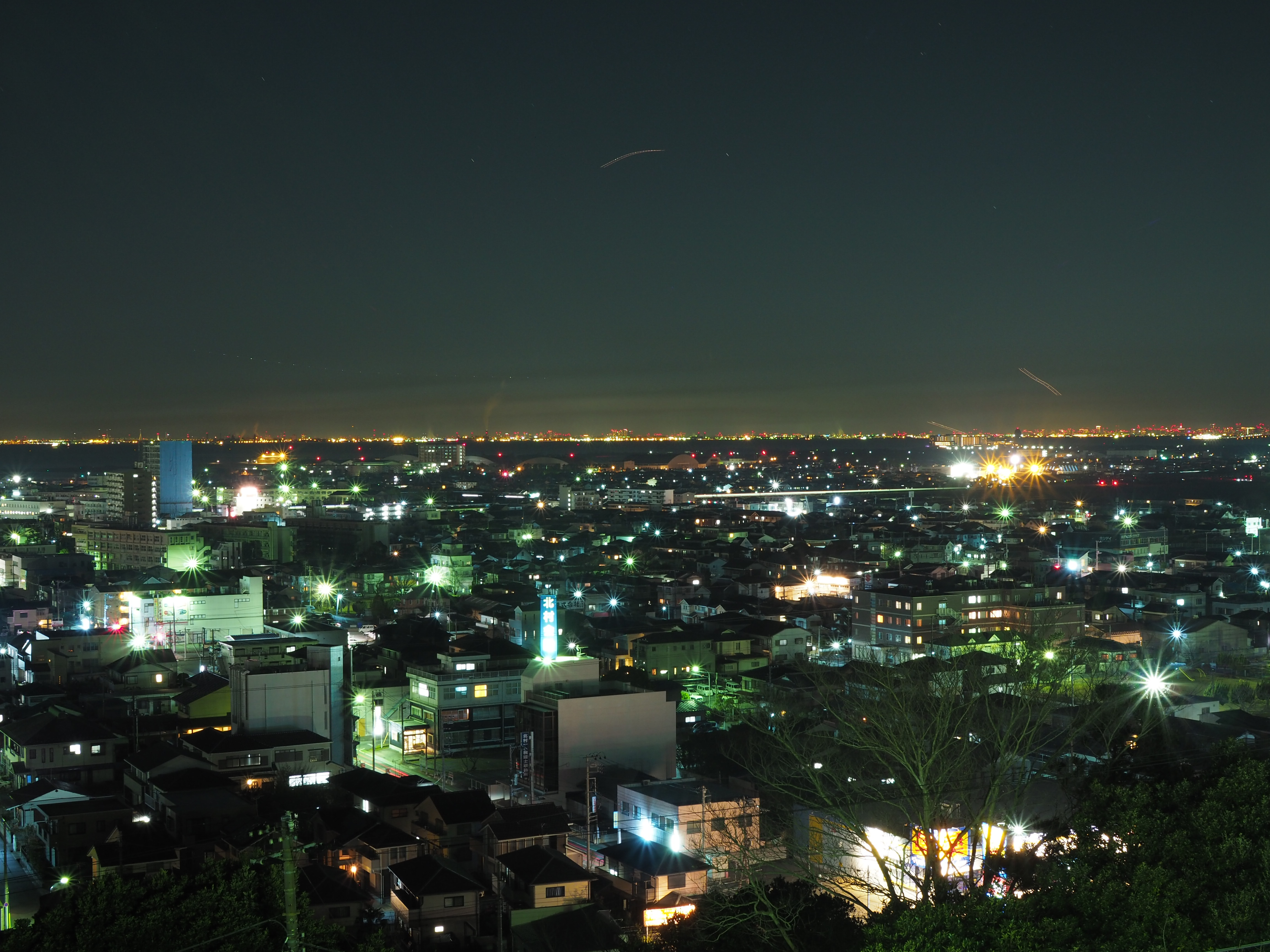 きみさらずタワーから見た夜景